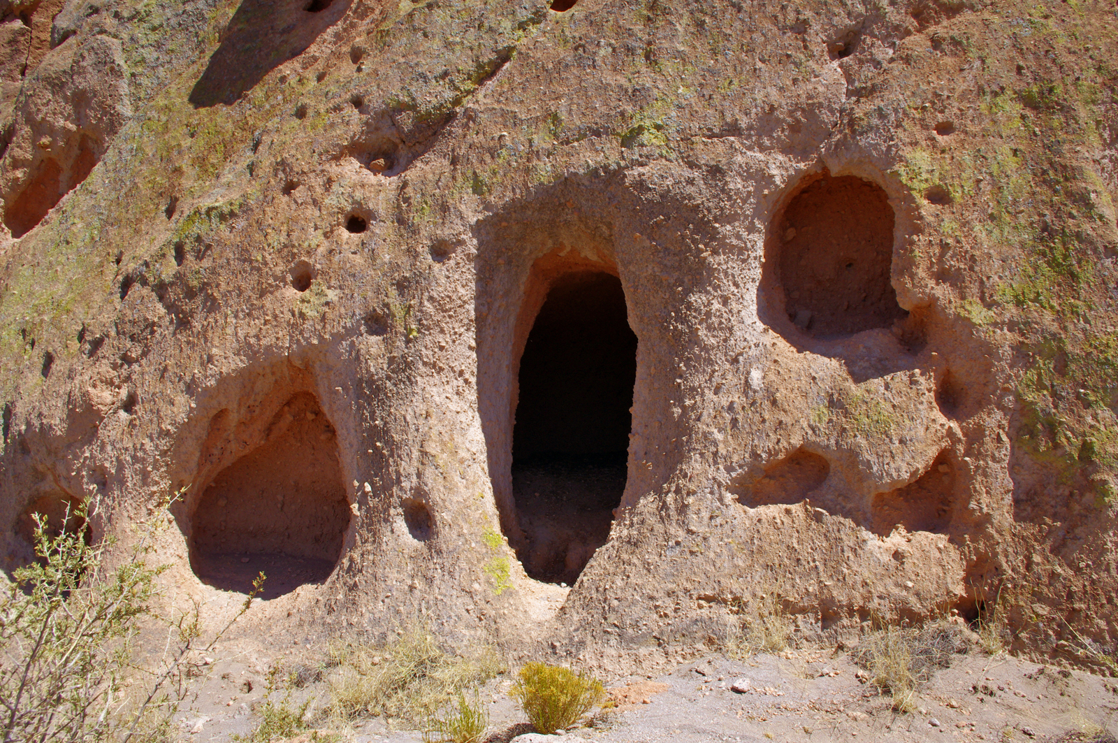 Video here